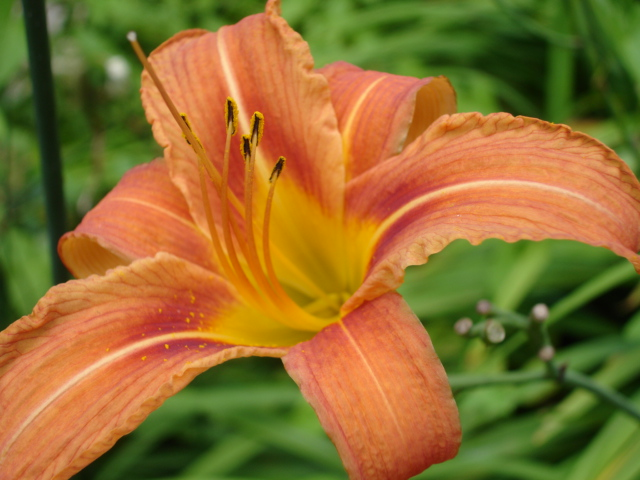 Hemerocallis fulva var. fulva